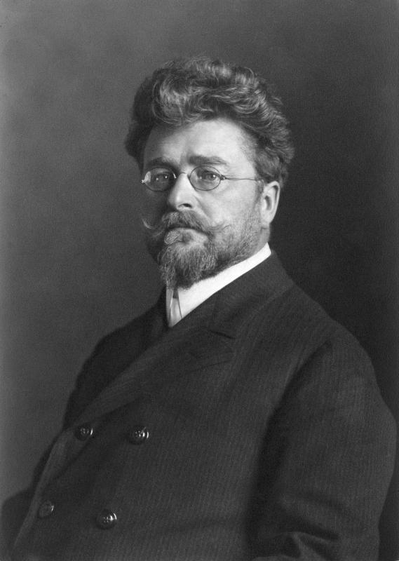 Ludwig Ganghofer (1855–1920)